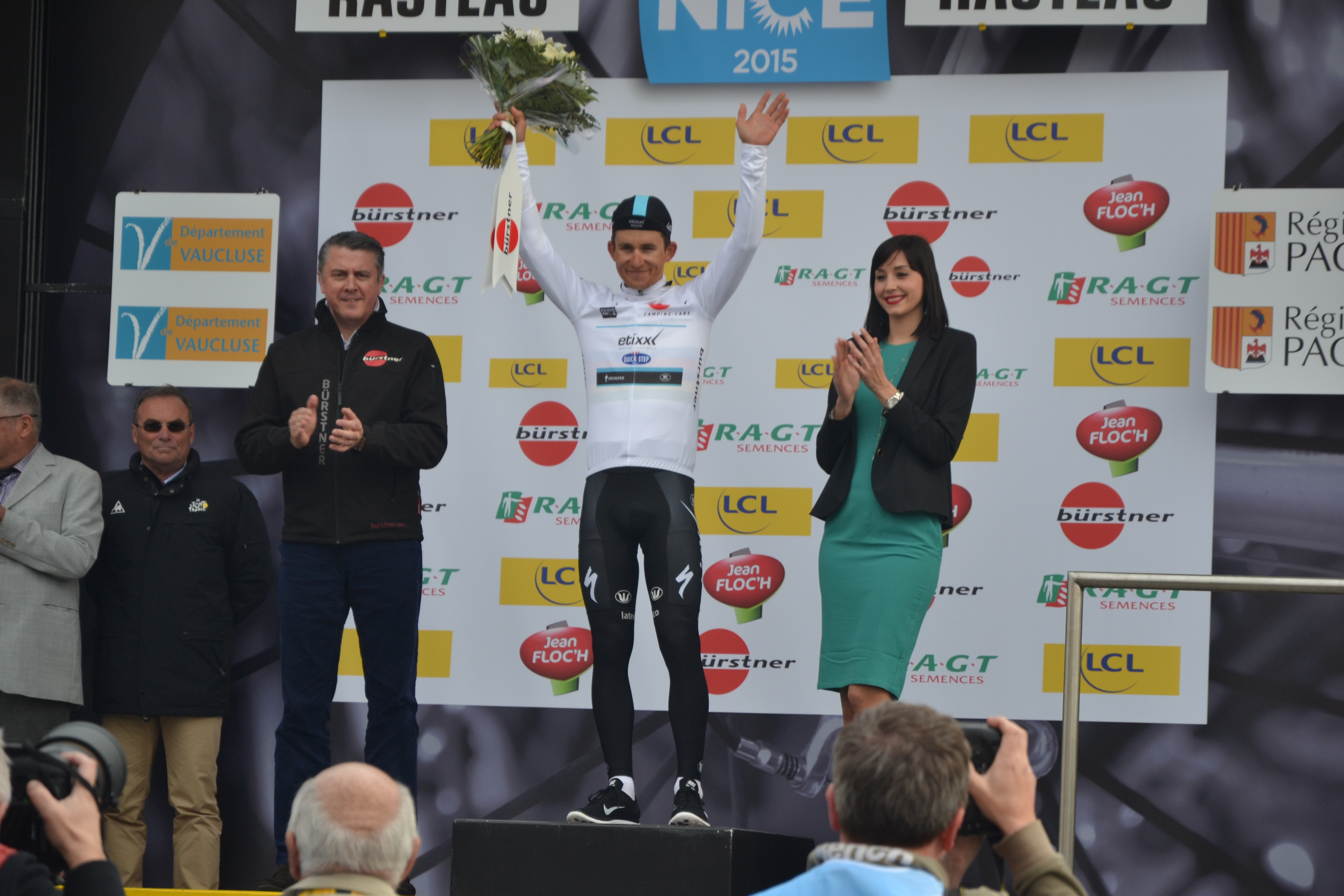 Lors de l'arrivée de l'étape Saint-Etienne - Rasteau du Paris - Nice 2015